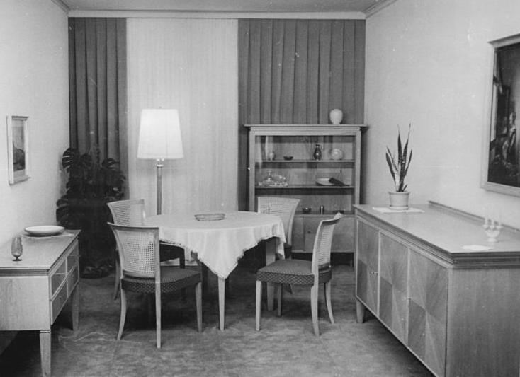 Wohnzimmer, VEB Deutsche Werkstätten Hellerau Zentralbild Wittig-Dietzmann Wi-Ho. 9.9.1954 Leipziger Messe 1954. Der volkseigene Betrieb Deutsche Werkstätten Hellerau, Dresden zeigt ein modernes Wohnzimmer Eichennatur mattiert. Dieses Wohnzimmer wurde von Prof. Bruno Paul entworfen.